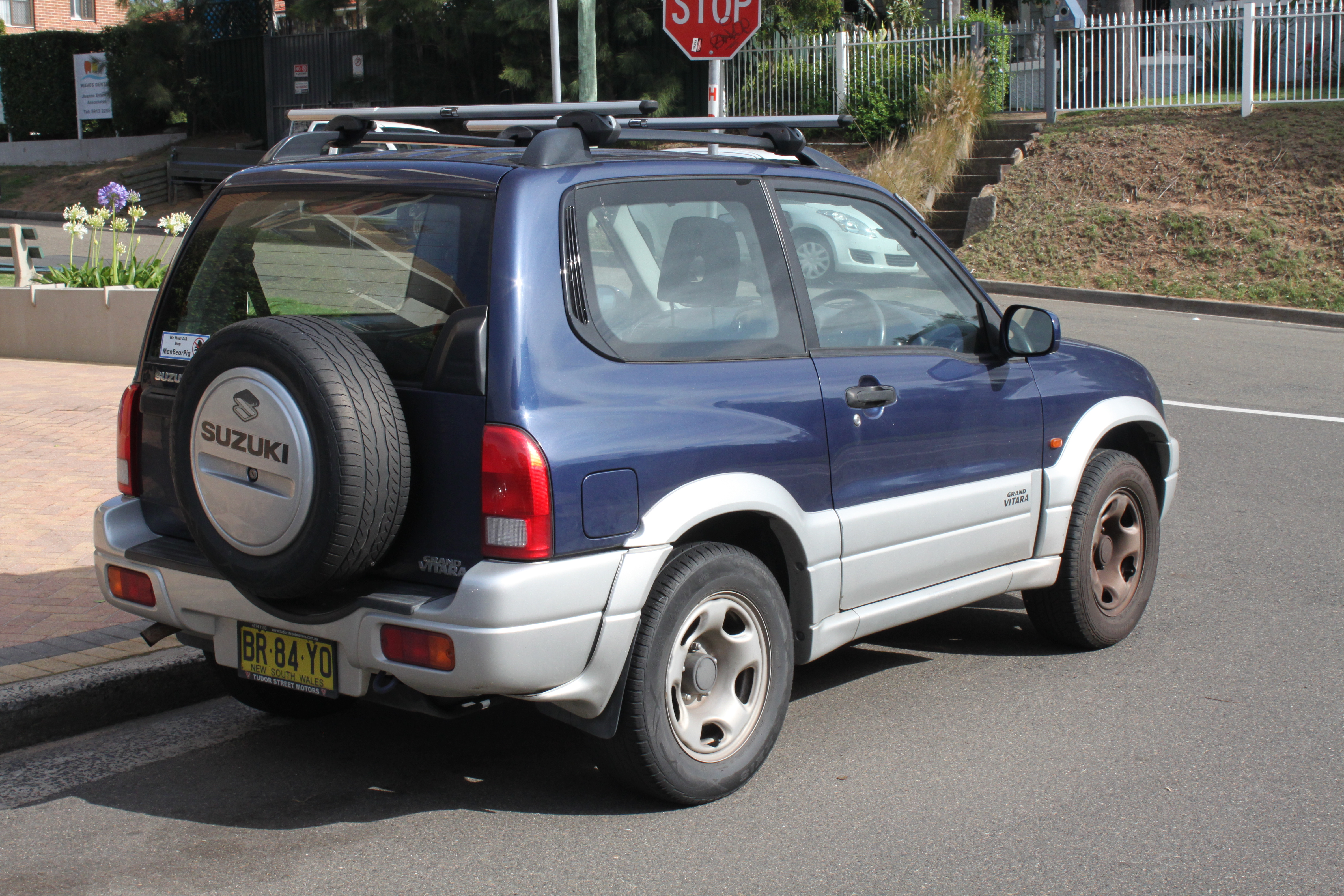 Suzuki Grand Vitara SQ416